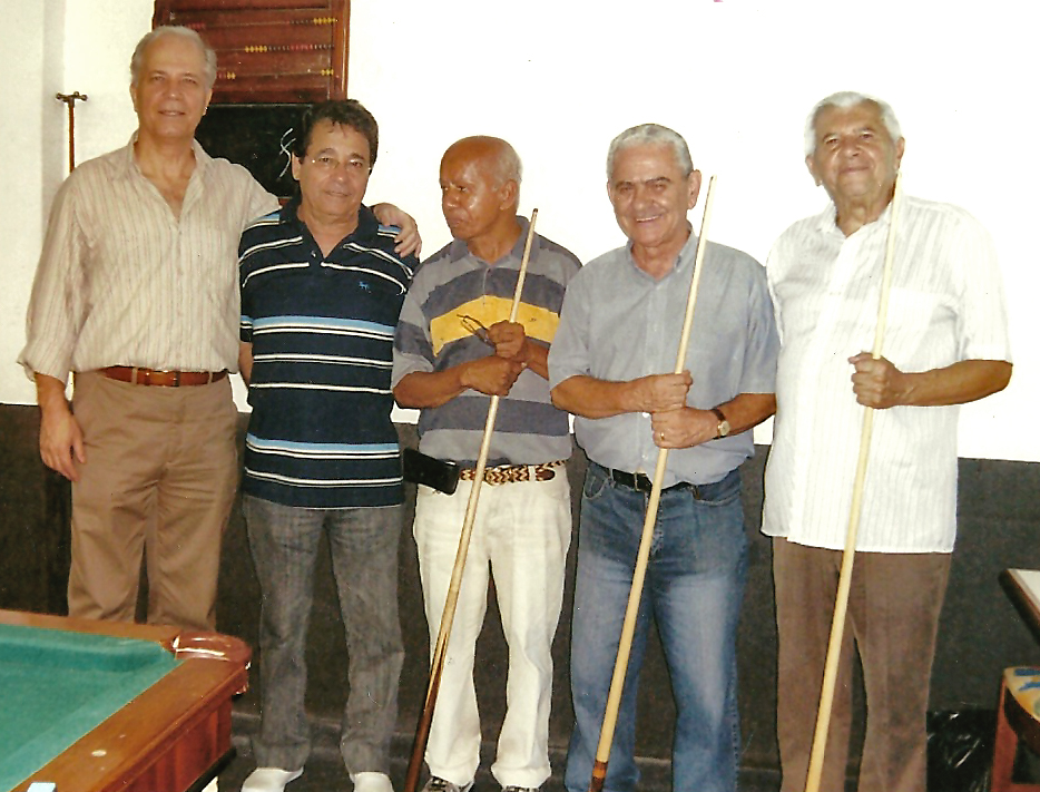 Carne Frita em O Magna Snooker - Rua Conselheiro Moreira de Barros, 1386 - Vila Santana - São Paulo, em 2007, com (da esquerda para direita): Orlando Eliano, Norival Pegrucci, "Carne Frita", Jurandyr Pegrucci e Joel do Amaral.